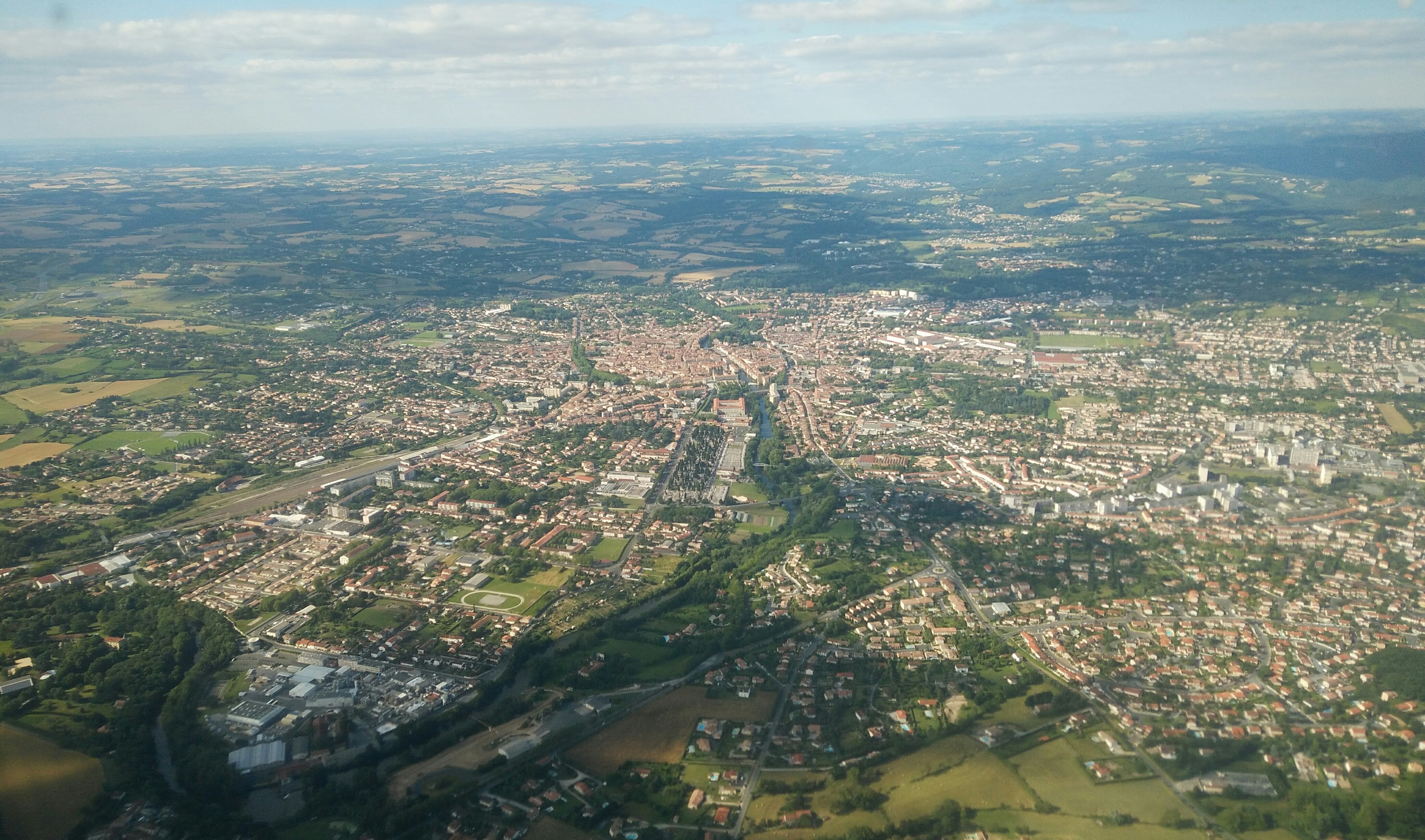 Vue aérienne de la ville de Castres, prise en photo dans un ATR 42 de la compagnie Hop